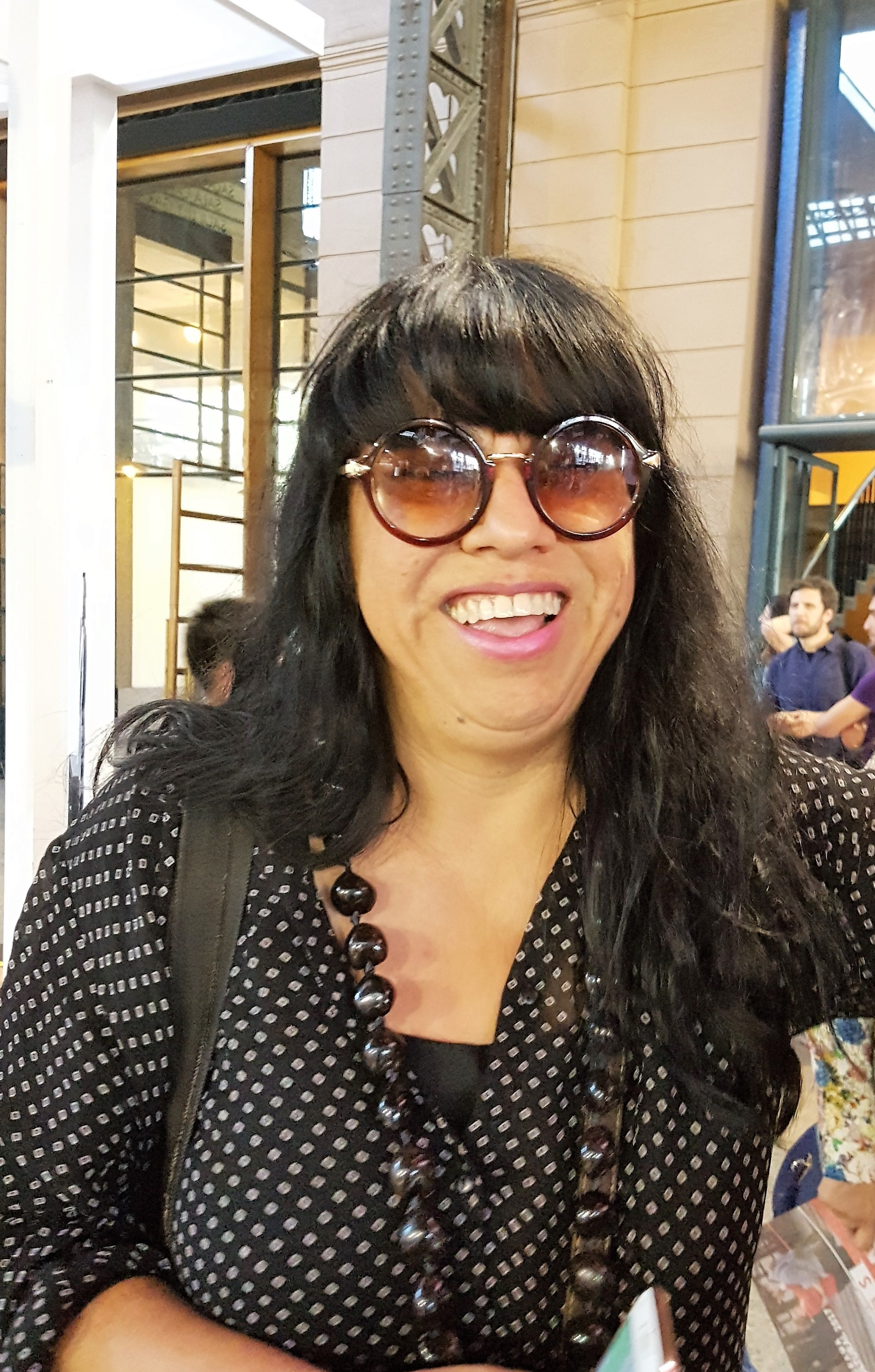 La poeta chilena Malú Urriola en la Feria Internacional del Libro de Santiago 2017.